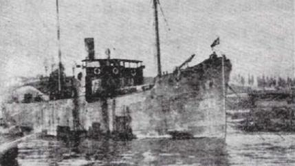 Türkler tarafından 1922'de ele geçirilerek Trabzon adı verilen Yunan kargo gemisi Enosis.